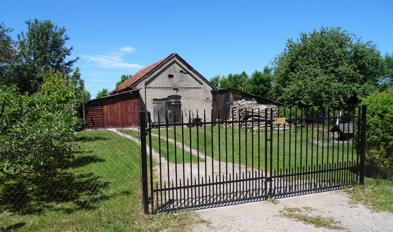 NIECZYNNA KUŹNIA.